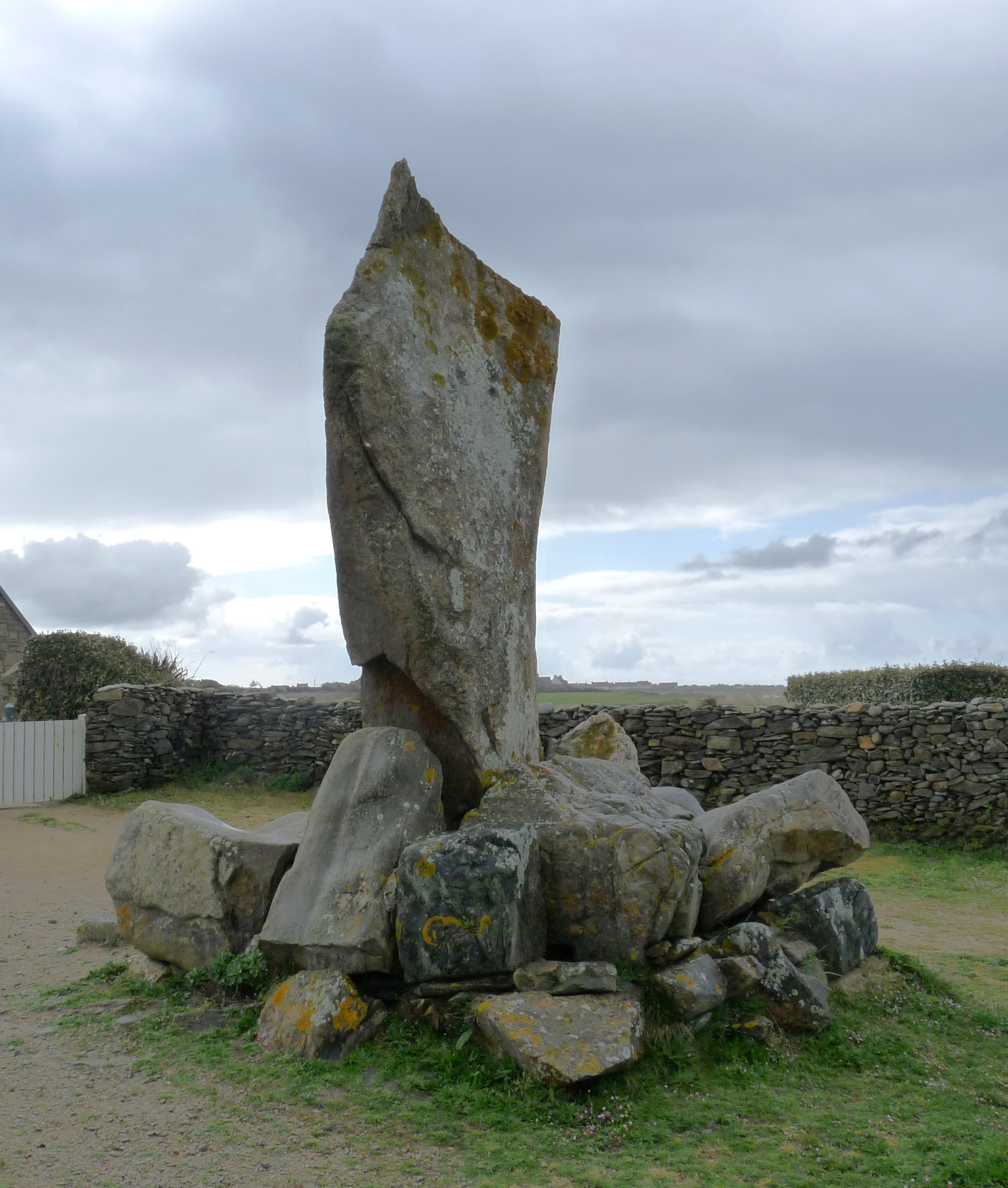 Menhir des Droits de l'Homme à Plozévet (Finistère)